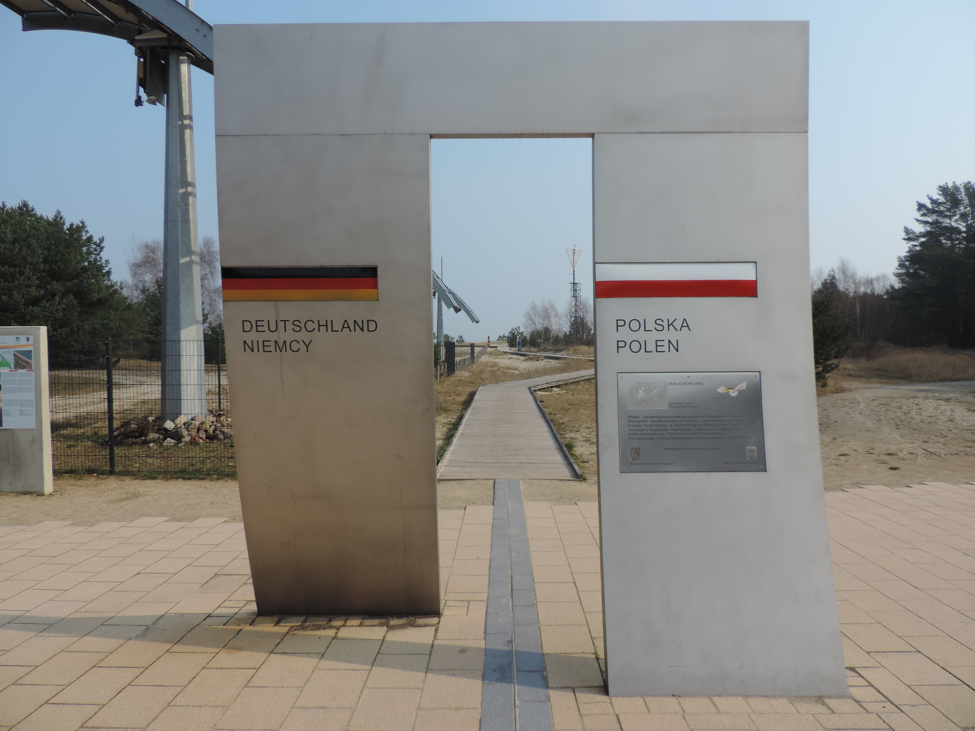 Grenze Deutschland - Polen bei Ahlbeck